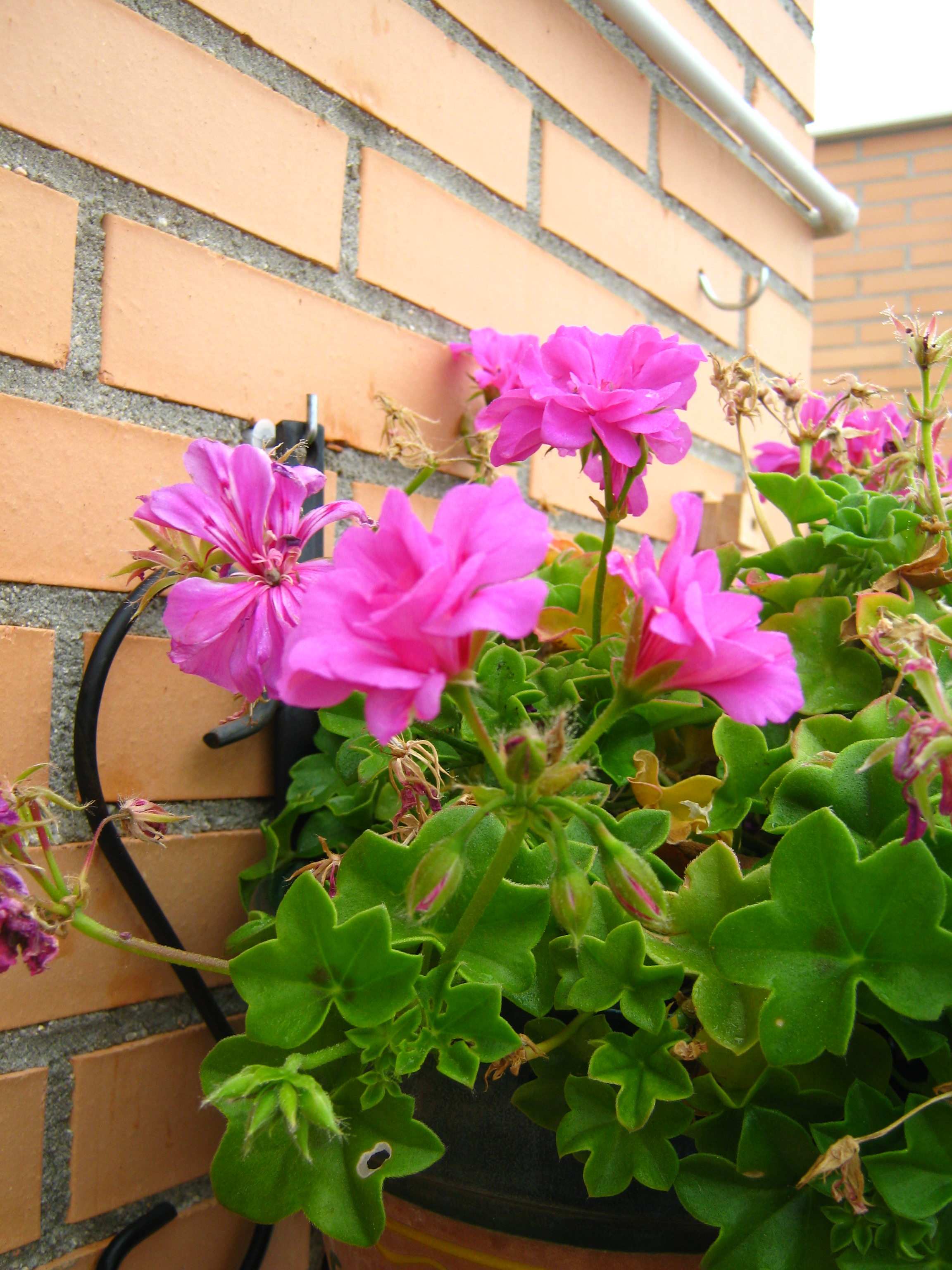 geranios de la variedad Gitanillla